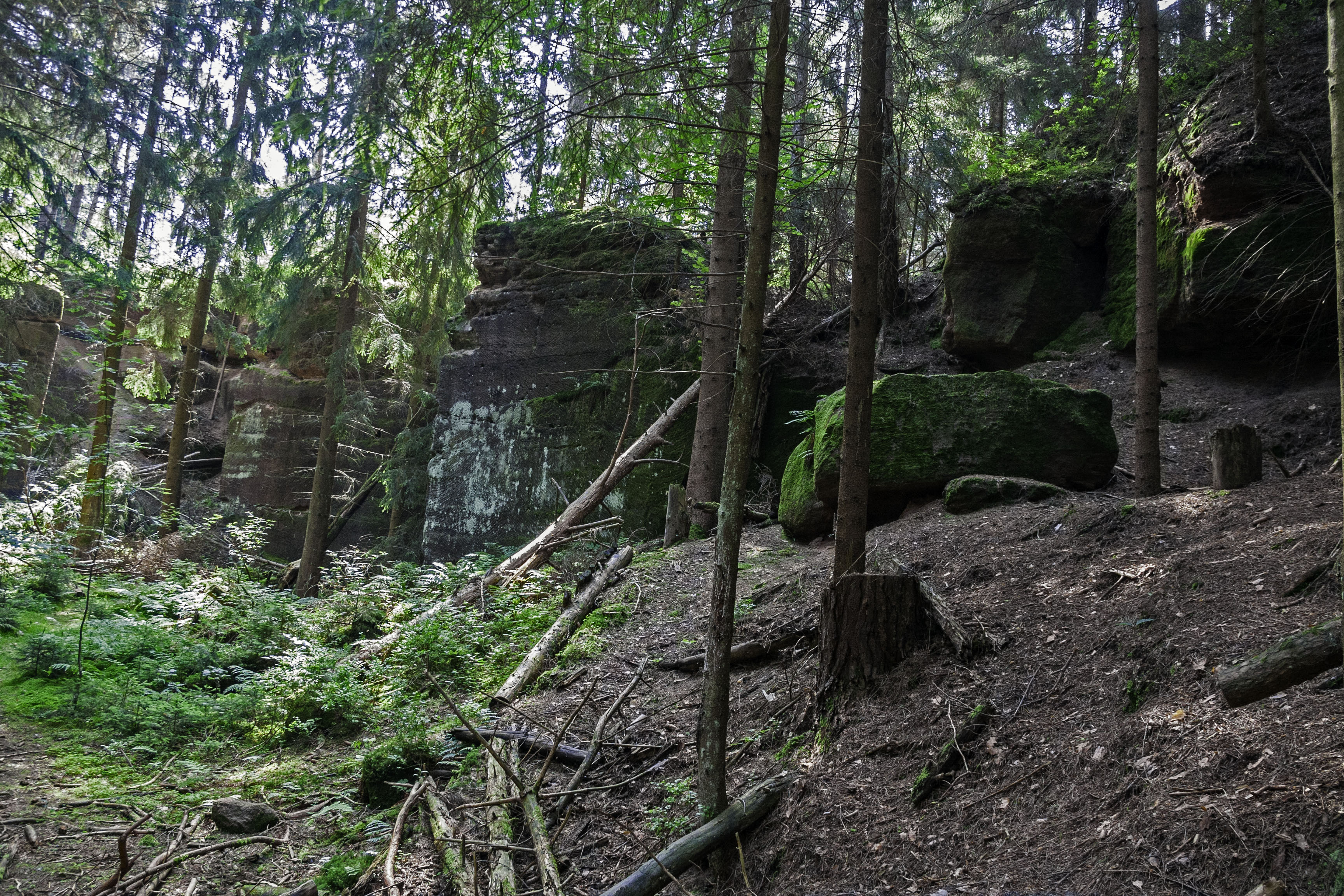 Schmausenbuck, Steinbrüche